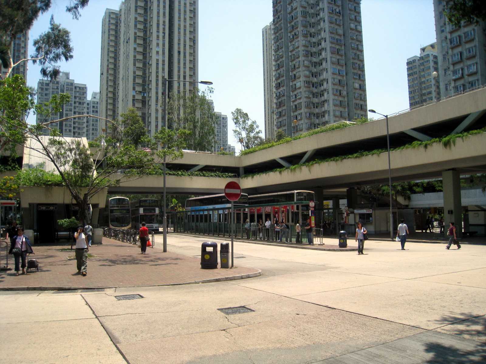 Tai Po Central Bus Terminus 大埔中心巴士總站